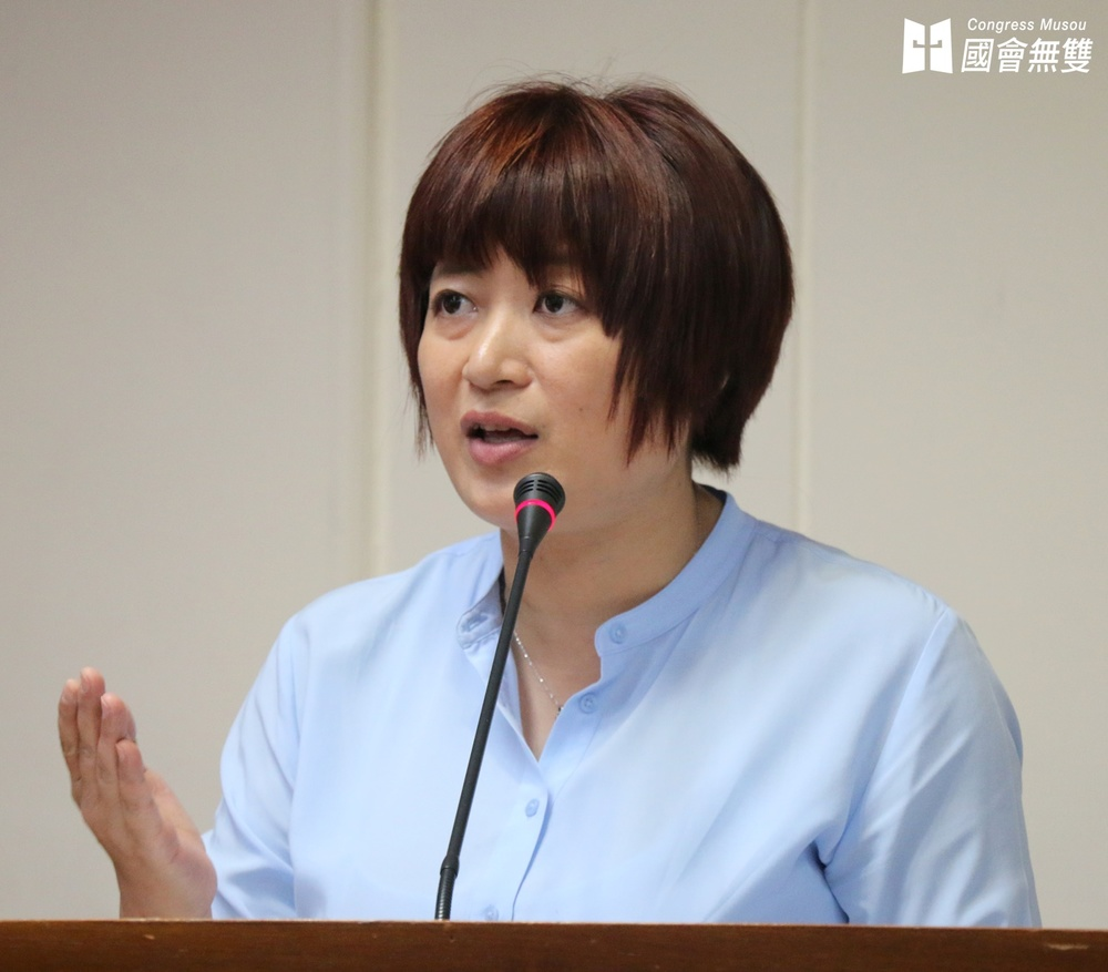 中文（台灣）: 民進黨立委蔡培慧質詢指出，除了在農地設置太陽能板，農業綠能還有很多選項，呼籲政府「不應把爭奪農地當作第一優先」。